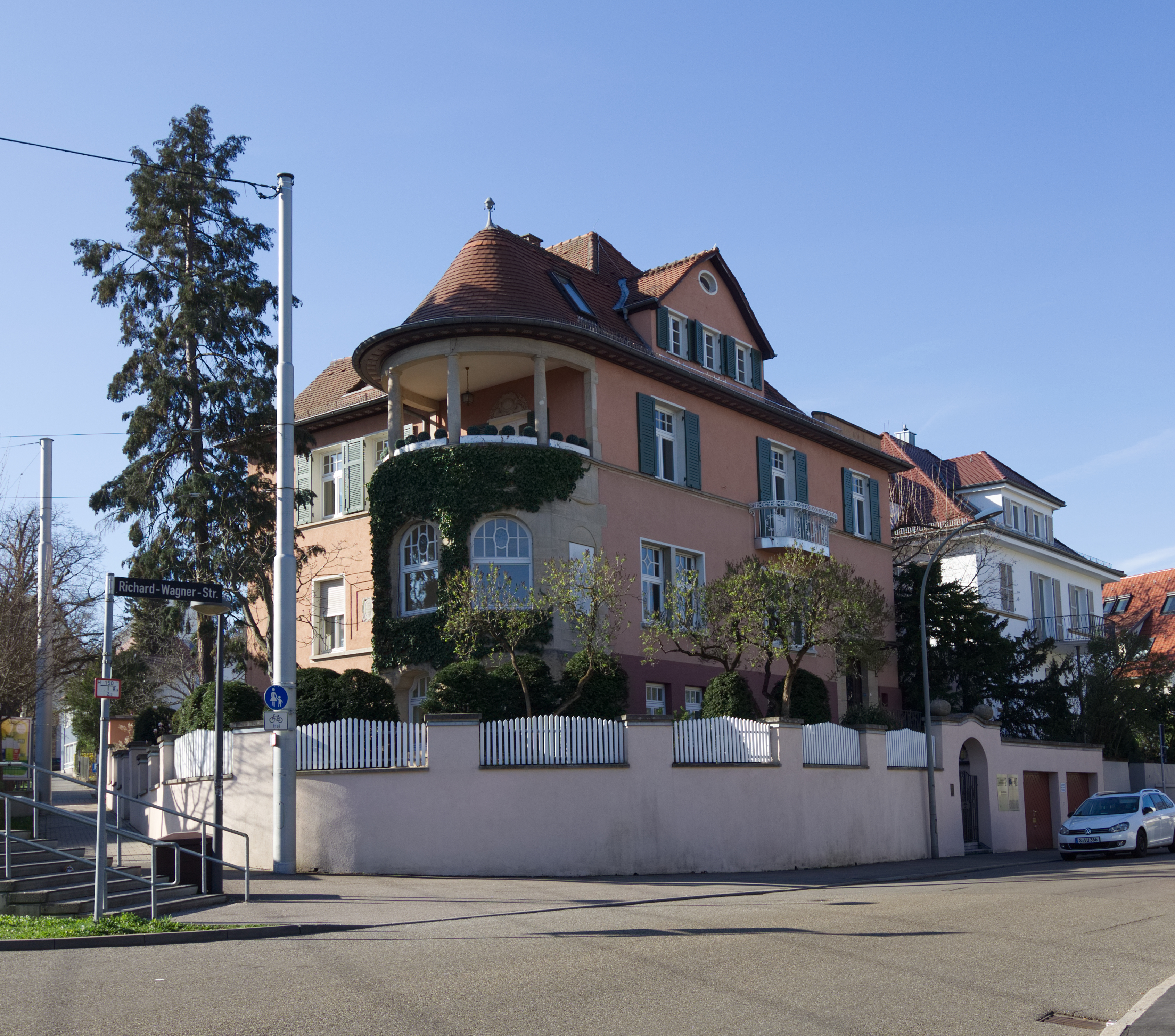 Villa Richard-Wagner-Straße 1, Stuttgart. Erbaut 1910-1911 von Kaiser und Weippert im Stil der Architektur der Reformbewegung, Geschützt nach § 2 DSchG.